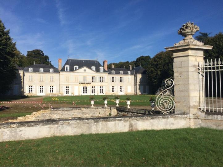 Photographie de la face Nord du château de Chevilly, avec le portail d'entrée, le pilastre et son fossé.